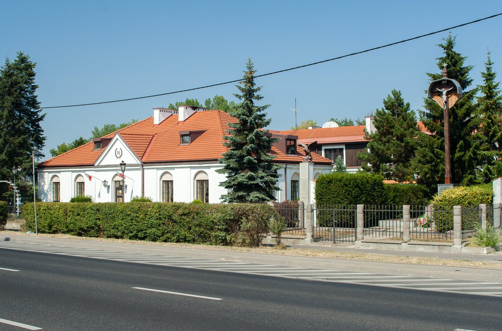 Dawna Karczma Wawerska (Austeria Wawerska) z 1 poł. XIX w, obecnie Zajazd Napoleoński. Styl klasycystyczny, nr rejestru 645, z dnia 01.07.1965. Warszawa, Wawer, ul. Płowiecka 83 Z prawej strony krzyż powstańczy upamiętniających poległych powstańców 1863 r.